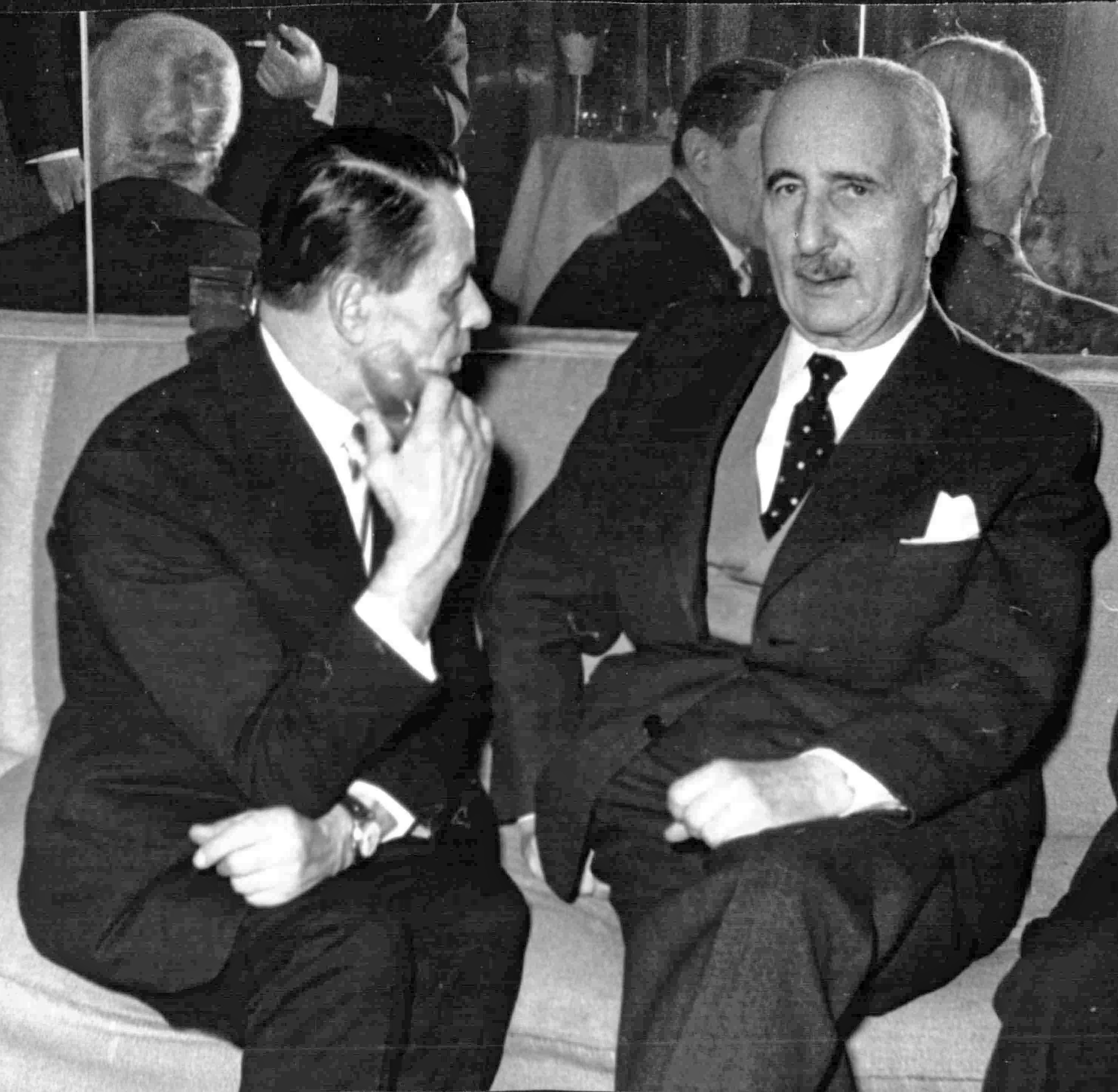 Copy of Władysław Tatarkiewicz and Armand Vetulani photograph in 1960 or later